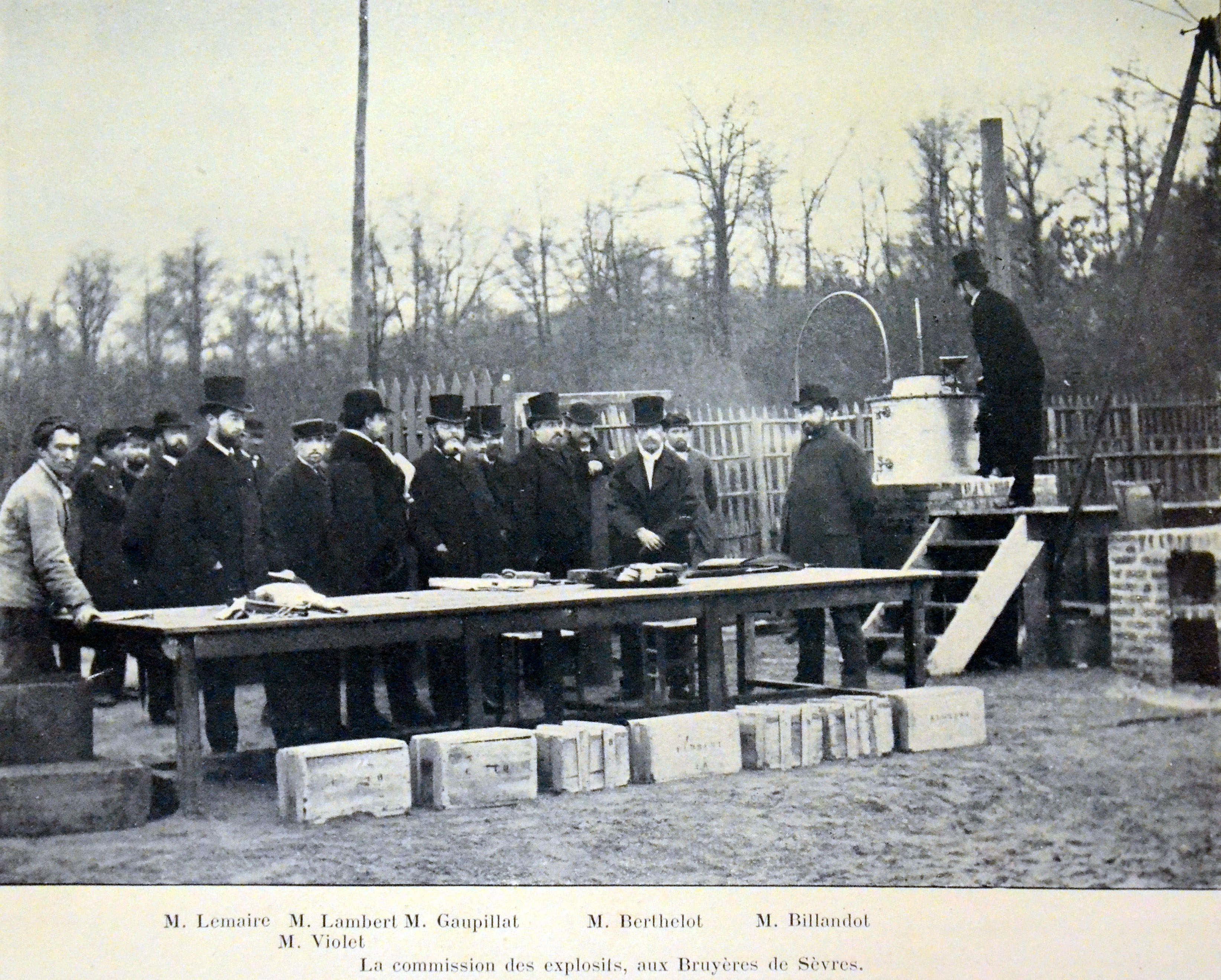 Photo légendée "la commission des explosifs, aux Bruyères de Sèvres" Photo ancienne, extraite d'un article de la revue française "Revue illustrée" (Tome relié 1902), portant sur Pierre Eugène Marcellin Berthelot, né le 25 octobre 1827 à Paris et mort le 18 mars 1907, Cliché : Valérian Gribayedoff.